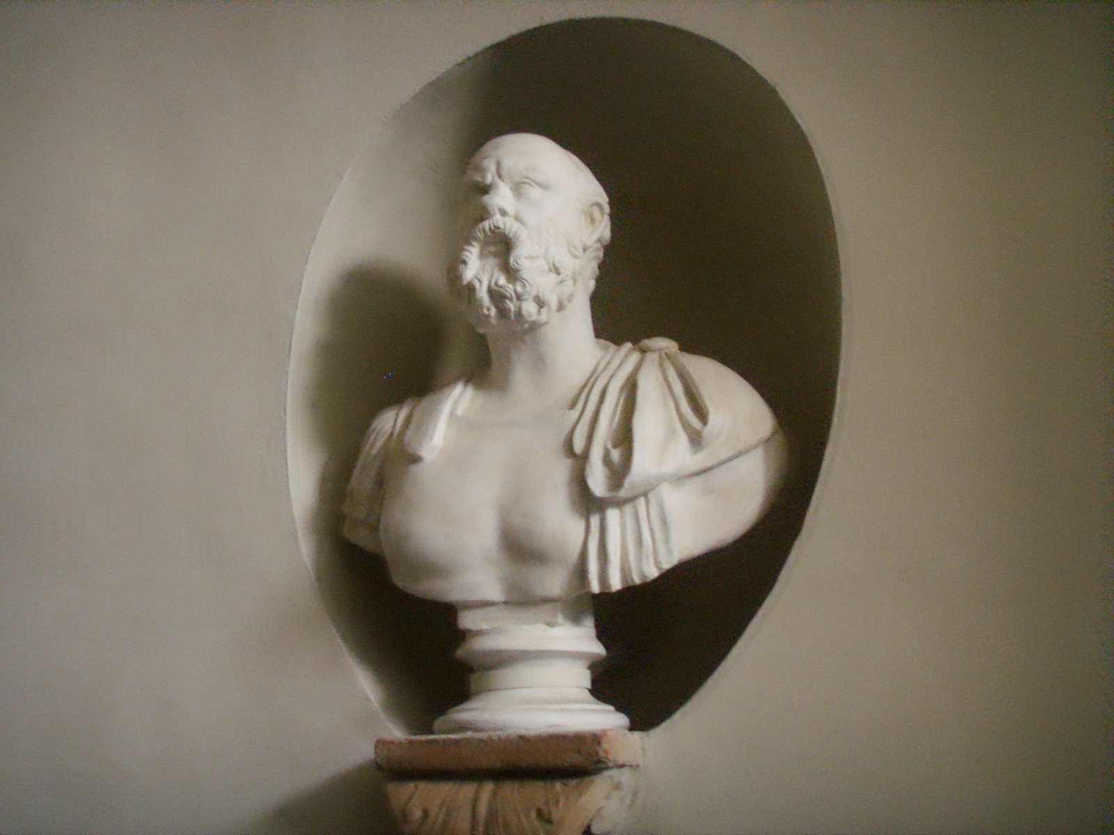 Palazzo dei visacci busto a baccio valori